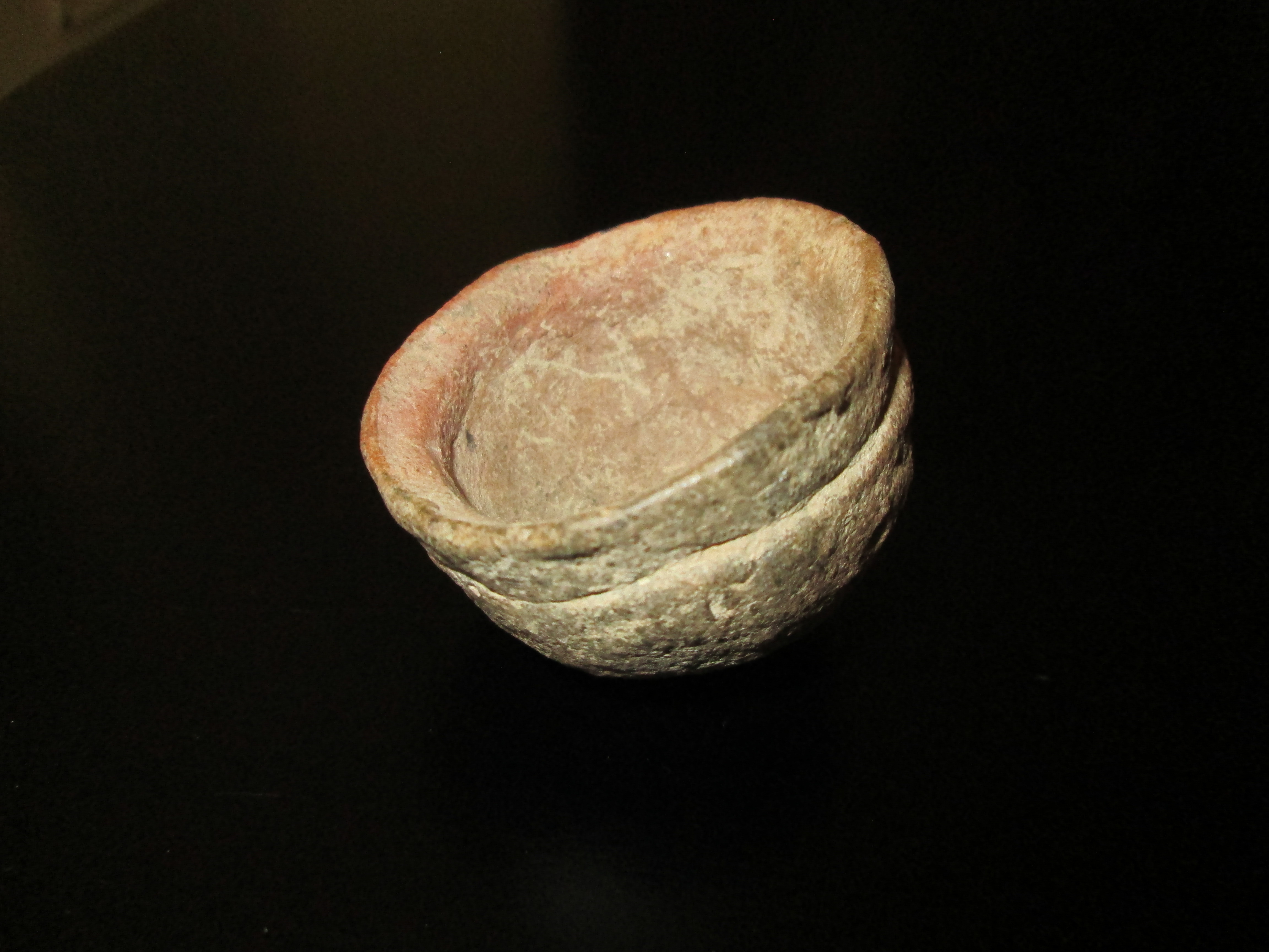 Vasija pequeña encontrada en Cabuya